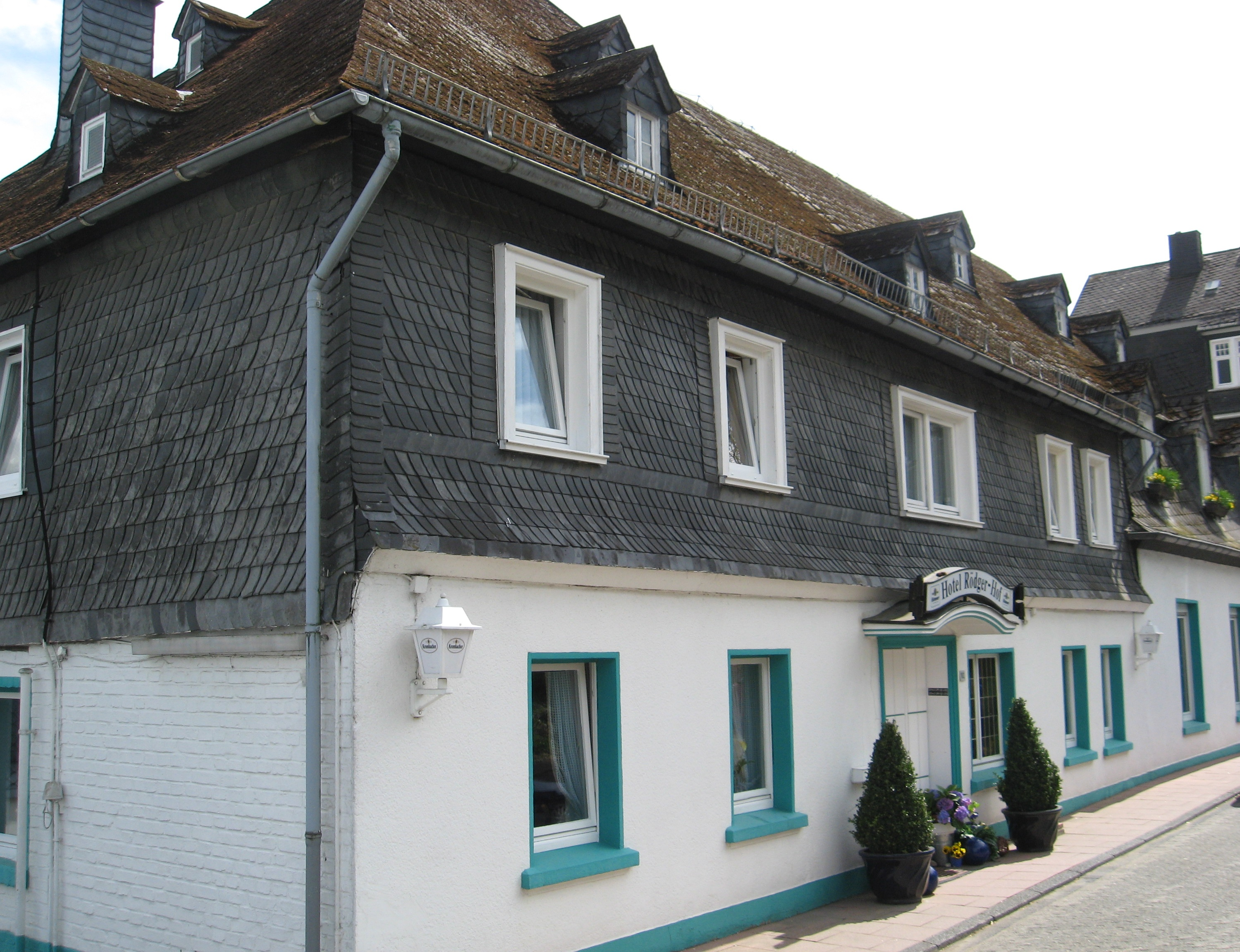 Hotel / Gastronomie Rödger Hof in Rödgen, Obersdorf (Wilnsdorf)